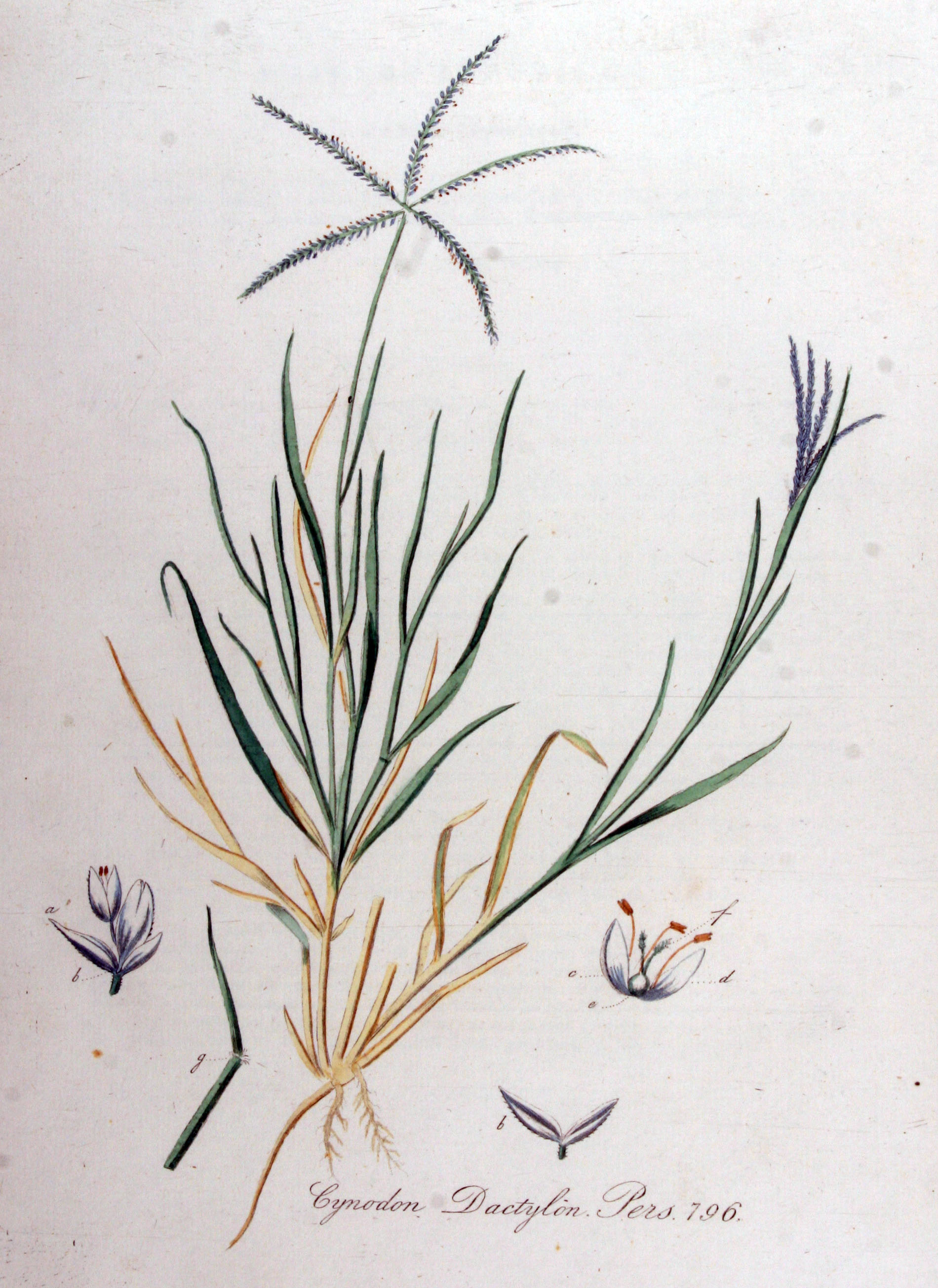 Cynodon dactylon (L.) Pers.